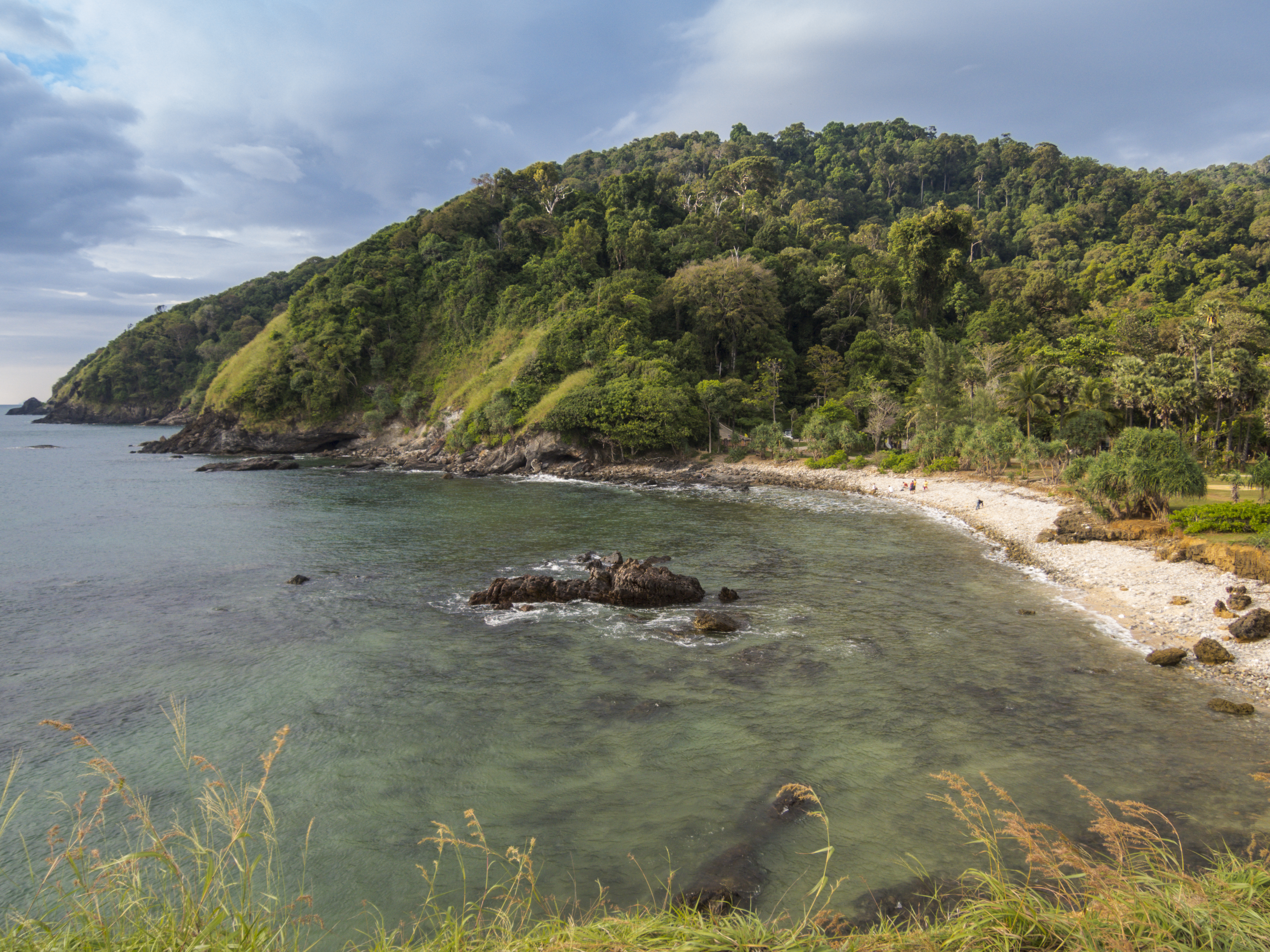 Beautiful Parc of Ko Lanta